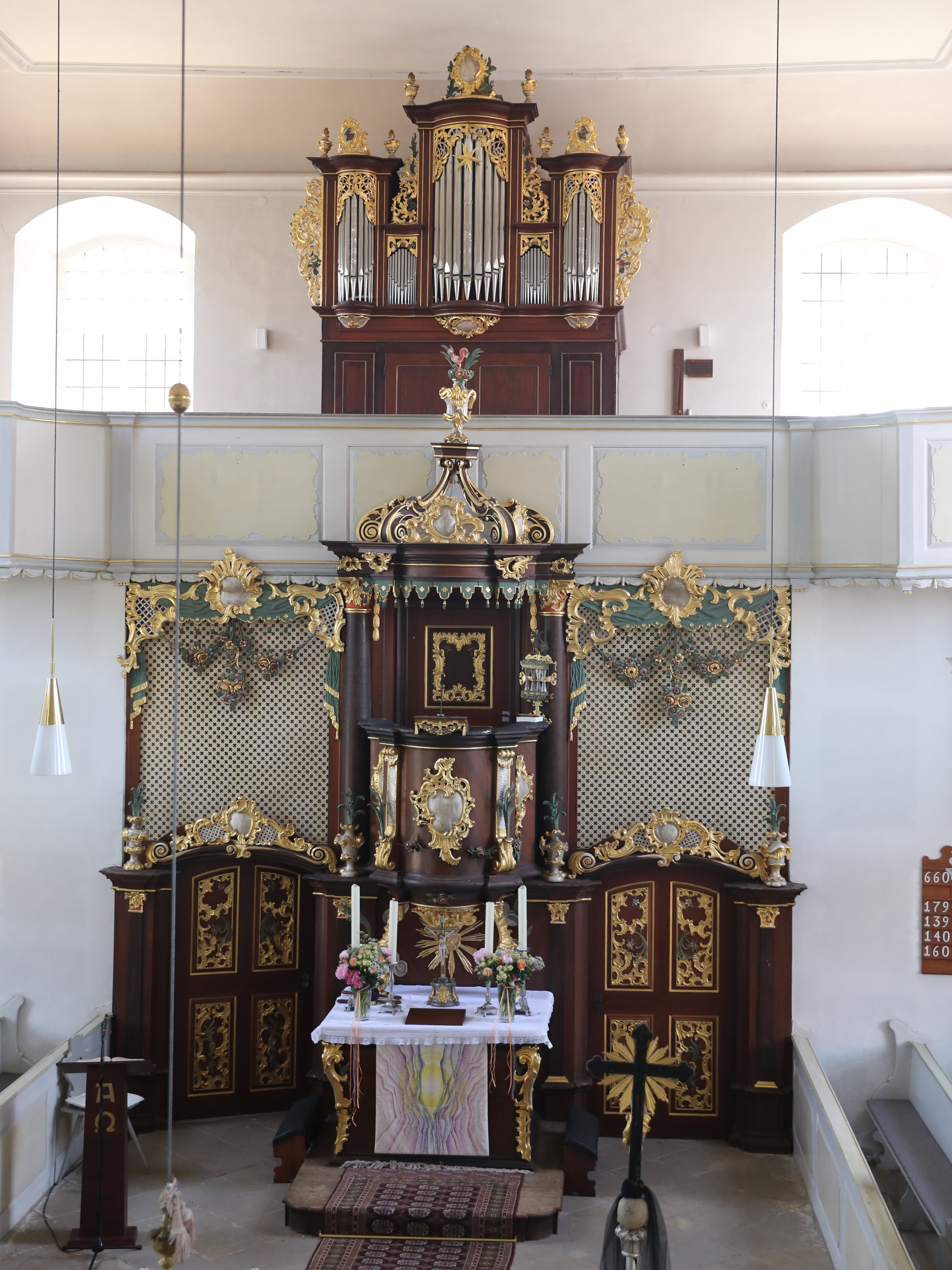 Evangelisch-lutherische Pfarr- und Schlosskirche in Fischbach